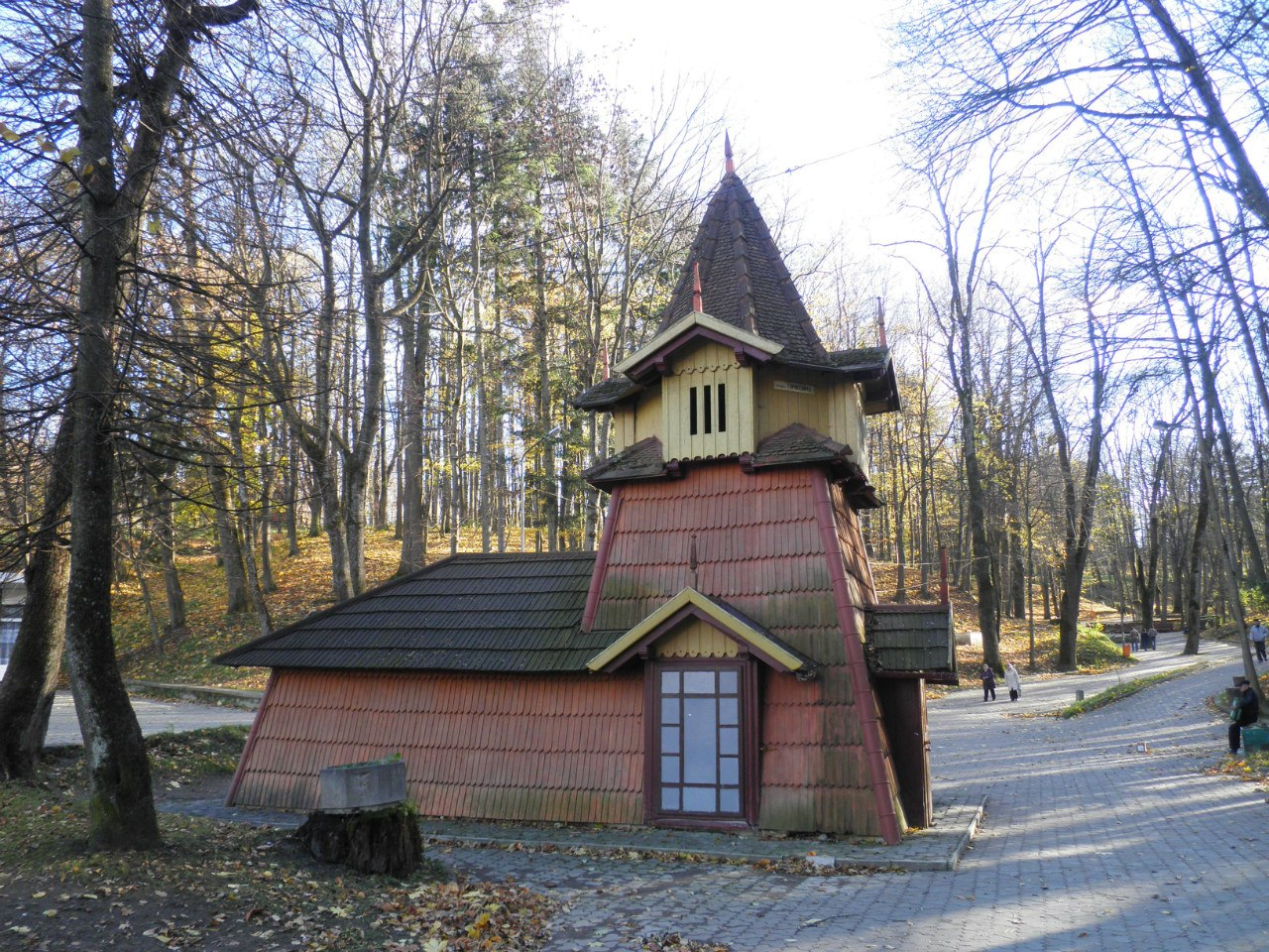 Джерело № 6 (колишній «Едвард») курорту «Трускавець»